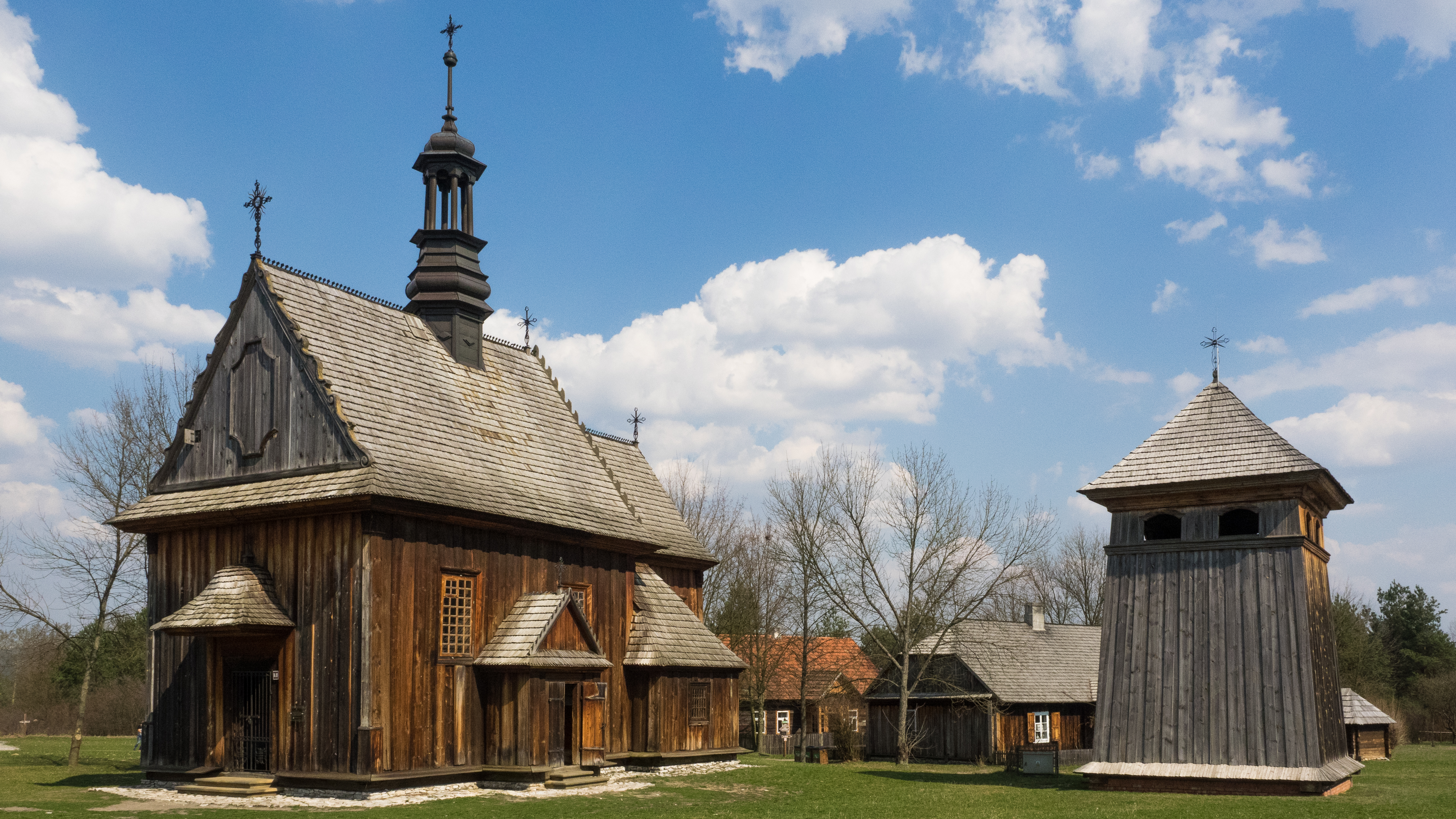 Tokarnia. Kościół szpitalny z Rogowa. Teren parku etnograficznego Muzeum Wsi Kieleckiej Wikidata has entry Q33491543 with data related to this item.